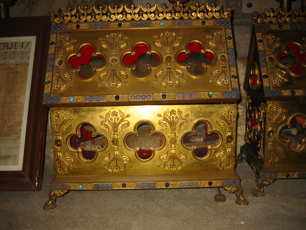 Reliquaire de Saint Ferjeux dans la crypte de l'Eglise Saint Ferjeux de Besançon